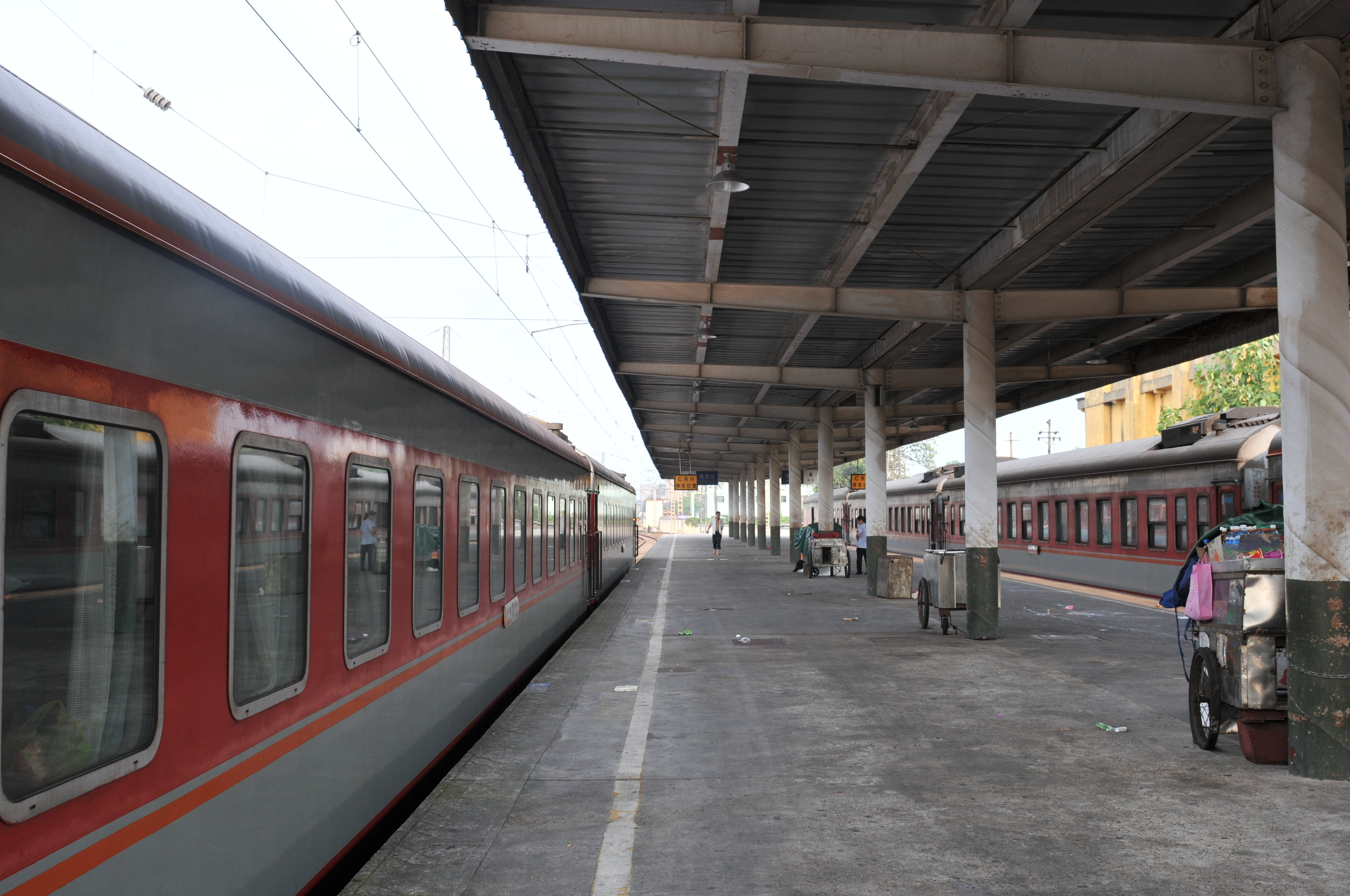 中国江西省鹰潭市火车站 China Jiangxi Yingtan Train station China Xinjiang Urumqi Welcome you to tour the, Китай Синьцзяна Урумчи приветствовать Вас на экскурсию, الصين ترحب زيارتك لاورومتشى فى شينجيانغ, 中国新疆のウルムチへの訪問を歓迎する, 中国新疆乌鲁木齐欢迎您来观光旅游